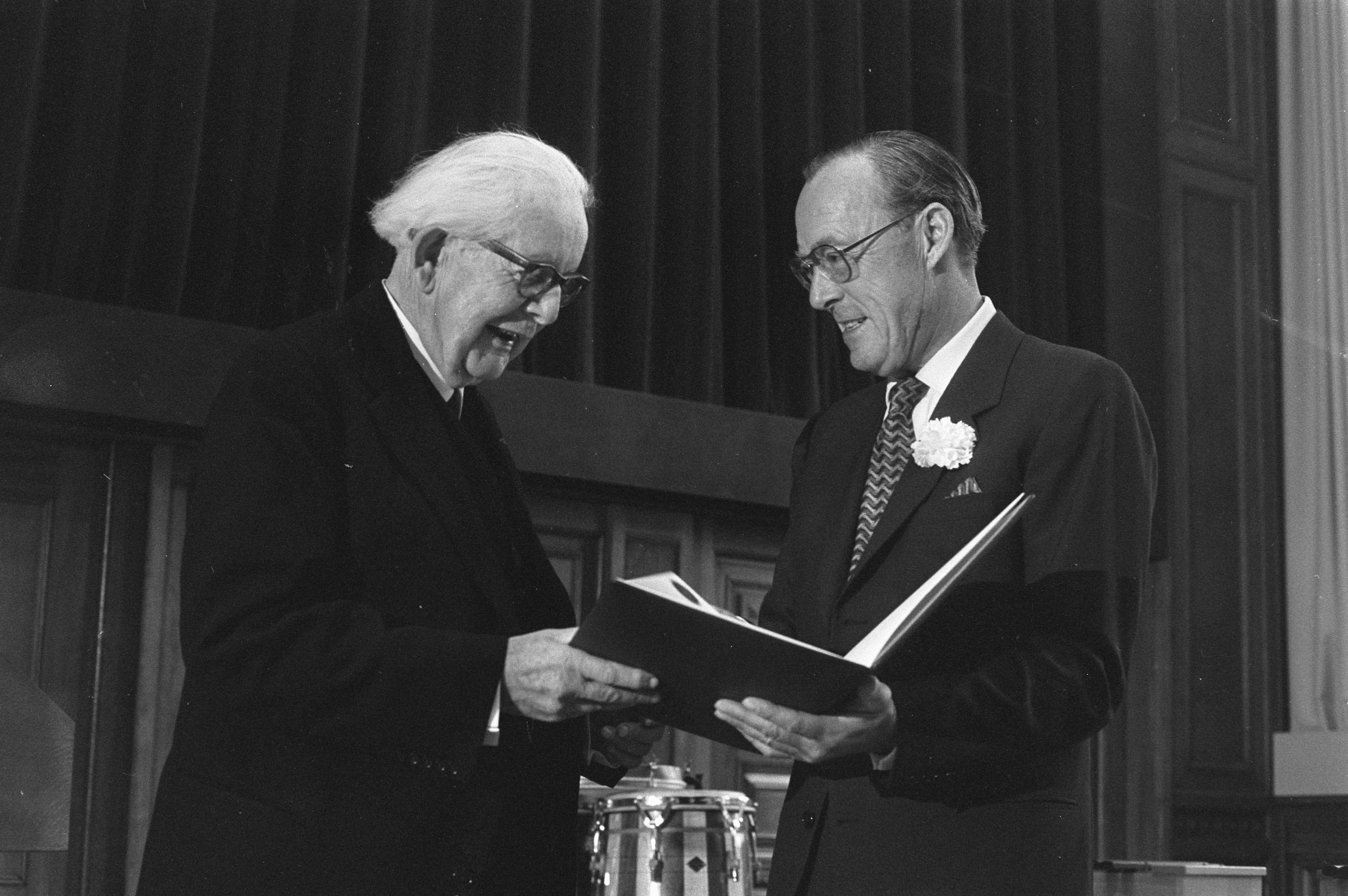 Collectie / Archief : Fotocollectie Anefo Reportage / Serie : Uitreiking van de Erasmusprijs 1972 in de aula van het Koninklijk Instituut voor de Tropen in Amsterdam Beschrijving : Uitreiking van de prijs door prins Bernhard aan de Zwitserse psycholoog-pedagoog professor Jean Piaget (l) Datum : 7 juni 1972 Locatie : Amsterdam, Noord-Holland Trefwoorden : hoogleraren, onderscheidingen, prinsen, wetenschappelijke prijzen Persoonsnaam : Bernhard (prins Nederland), Piaget, Jean Fotograaf : Bert Verhoeff / Anefo Auteursrechthebbende : Nationaal Archief Materiaalsoort : Negatief (zwart/wit) Nummer archiefinventaris : bekijk toegang 2.24.01.05 Bestanddeelnummer : 925-6518